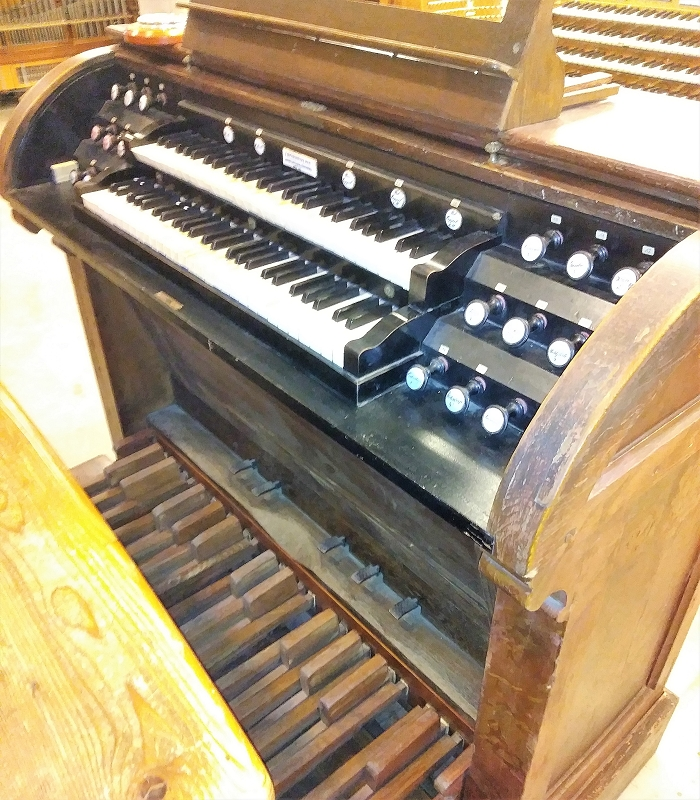 Orgel- und Spieltischsammlung im Untergeschoss der Zollingerhalle (Orgelzentrum Valley)